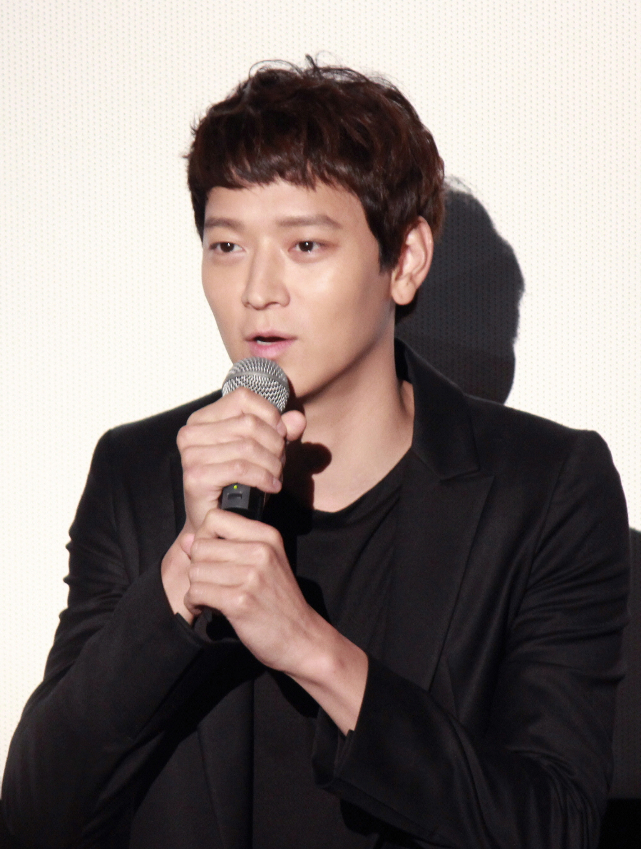 140802 군도 부산 무대인사 강동원